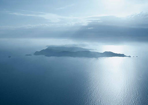 Ile Porquerolles